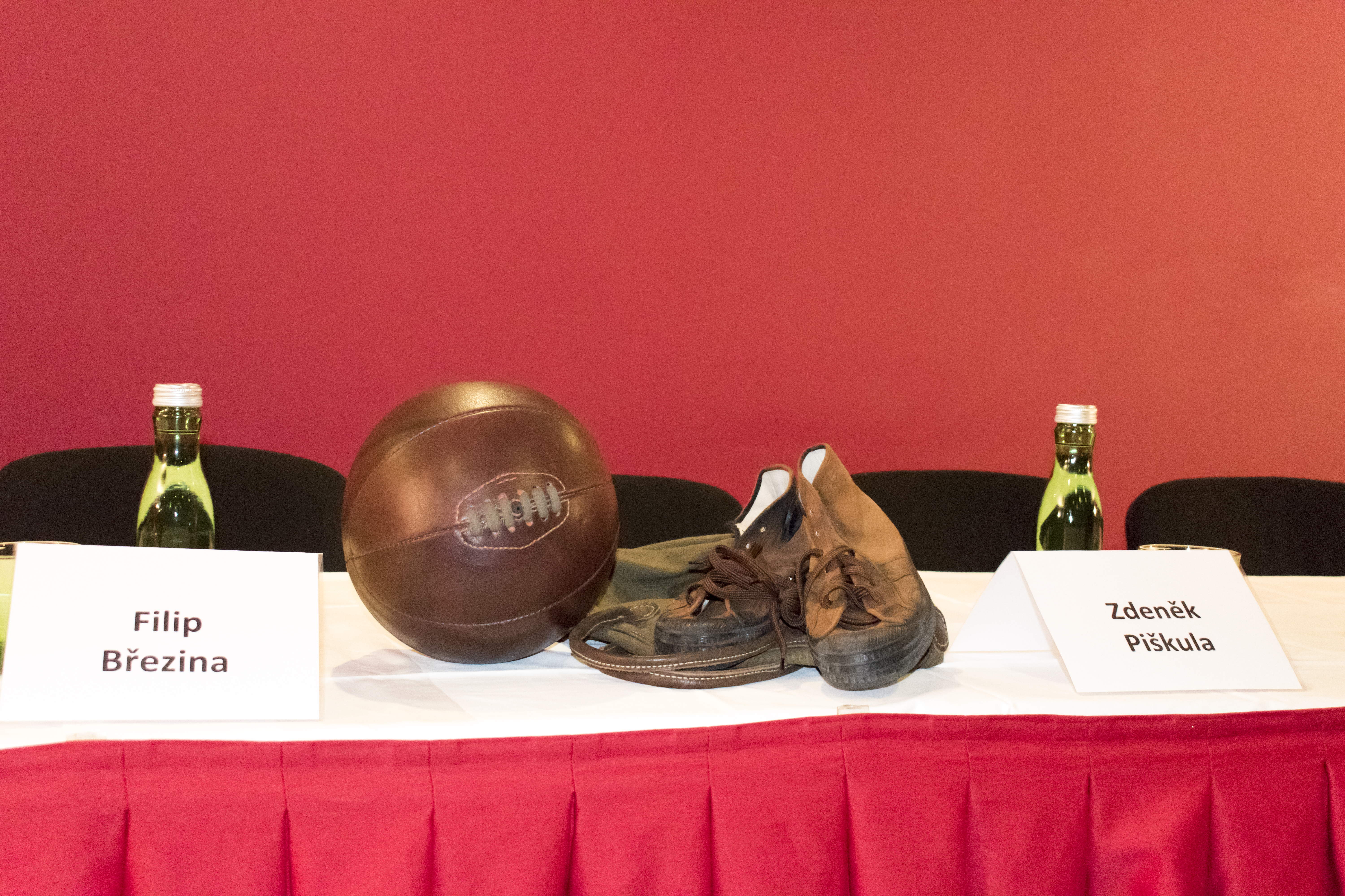 Novinářská konference 19.10.2018. Autor: Blanka Borová (Karolína Černá) pro Kritiky.cz